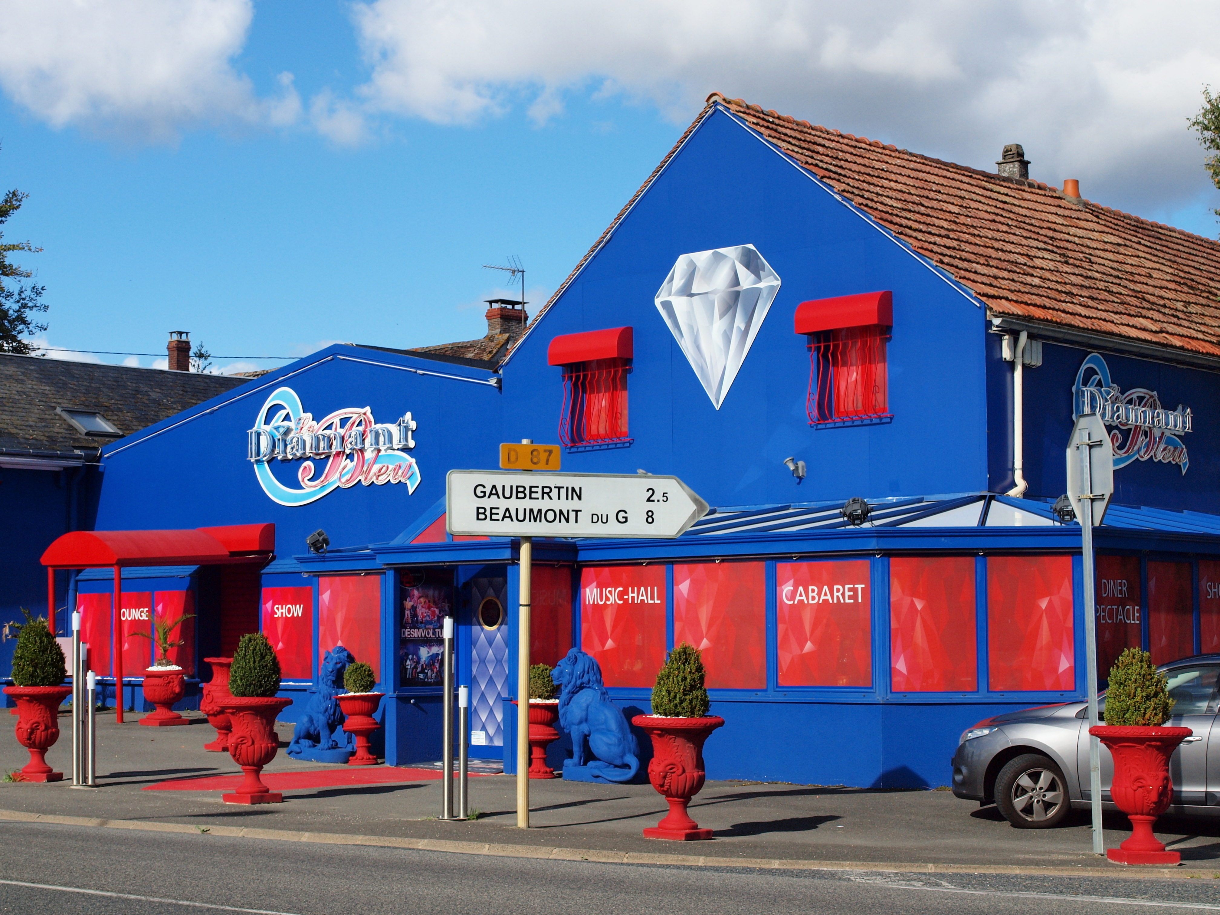 Barville-en-Gâtinais (Loiret, France) ; cabaret Le Diamant bleu